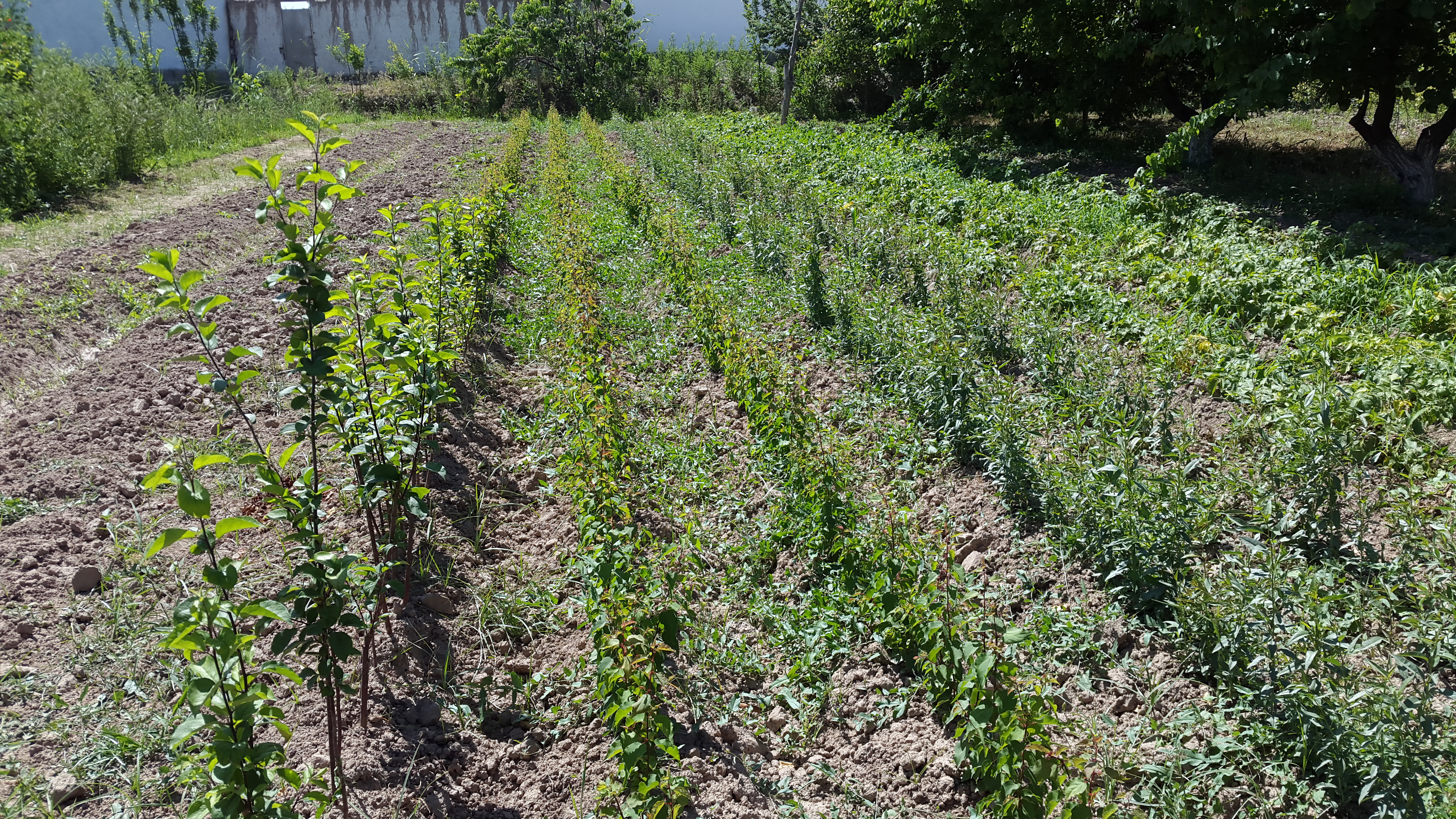 Первое поле питомника сеянцев абрикоса